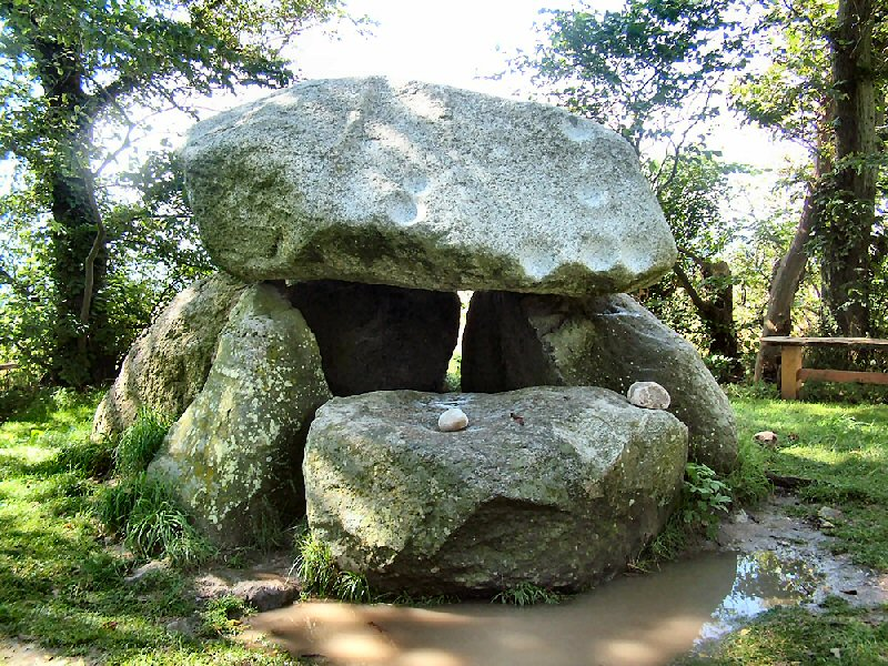 Klokkestenen, på Lyø, er et flere tusind år gammelt dysekammer.